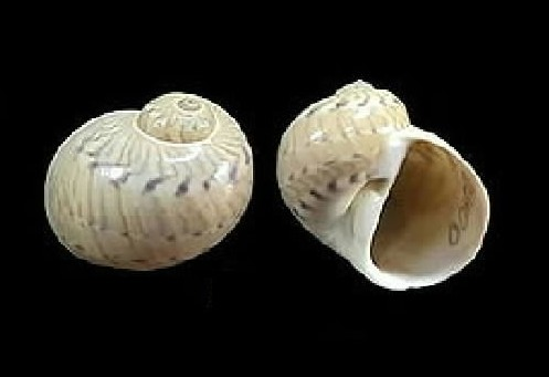 Naticarius canrena del estado Sucre.